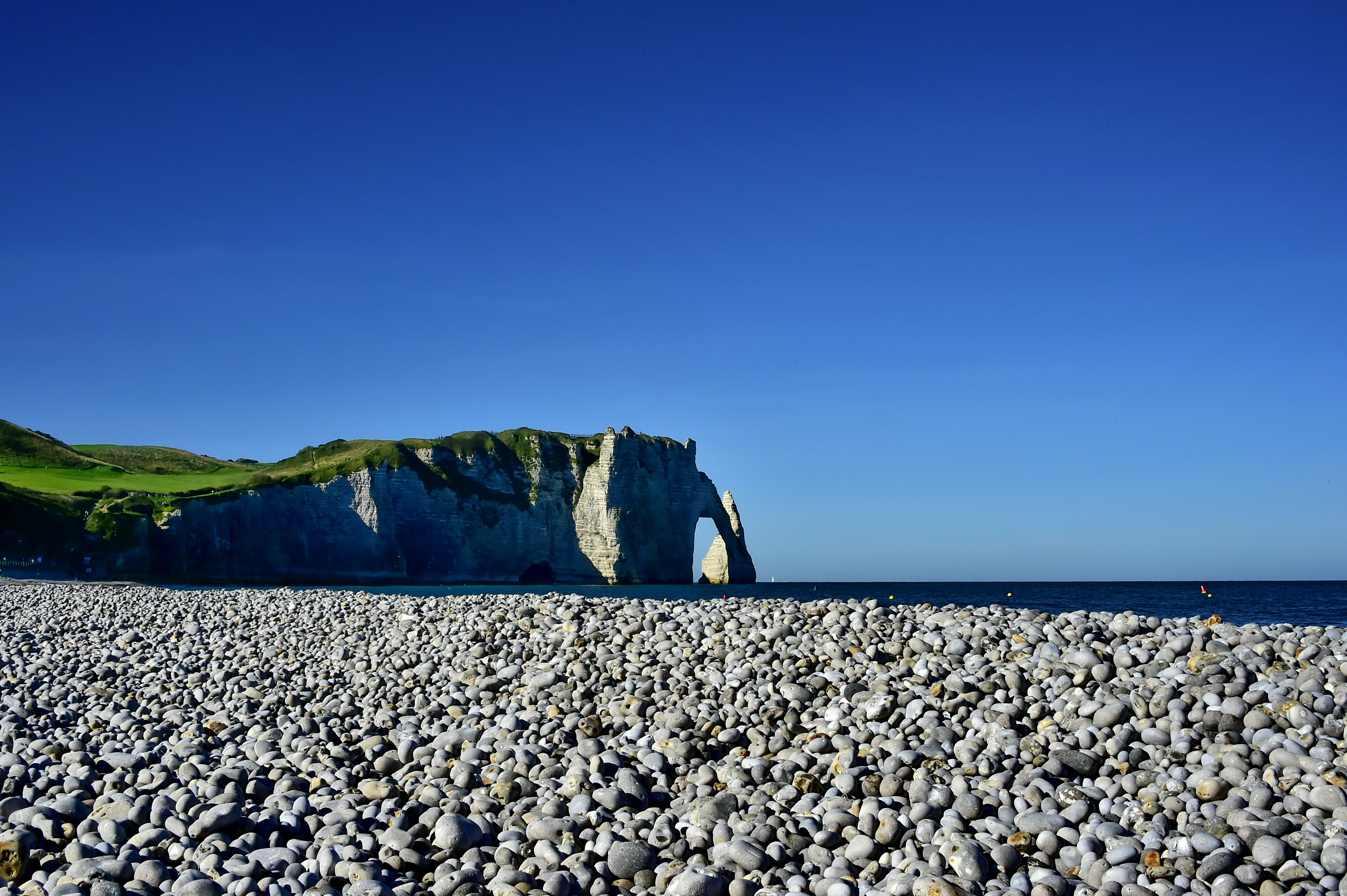 Etretat